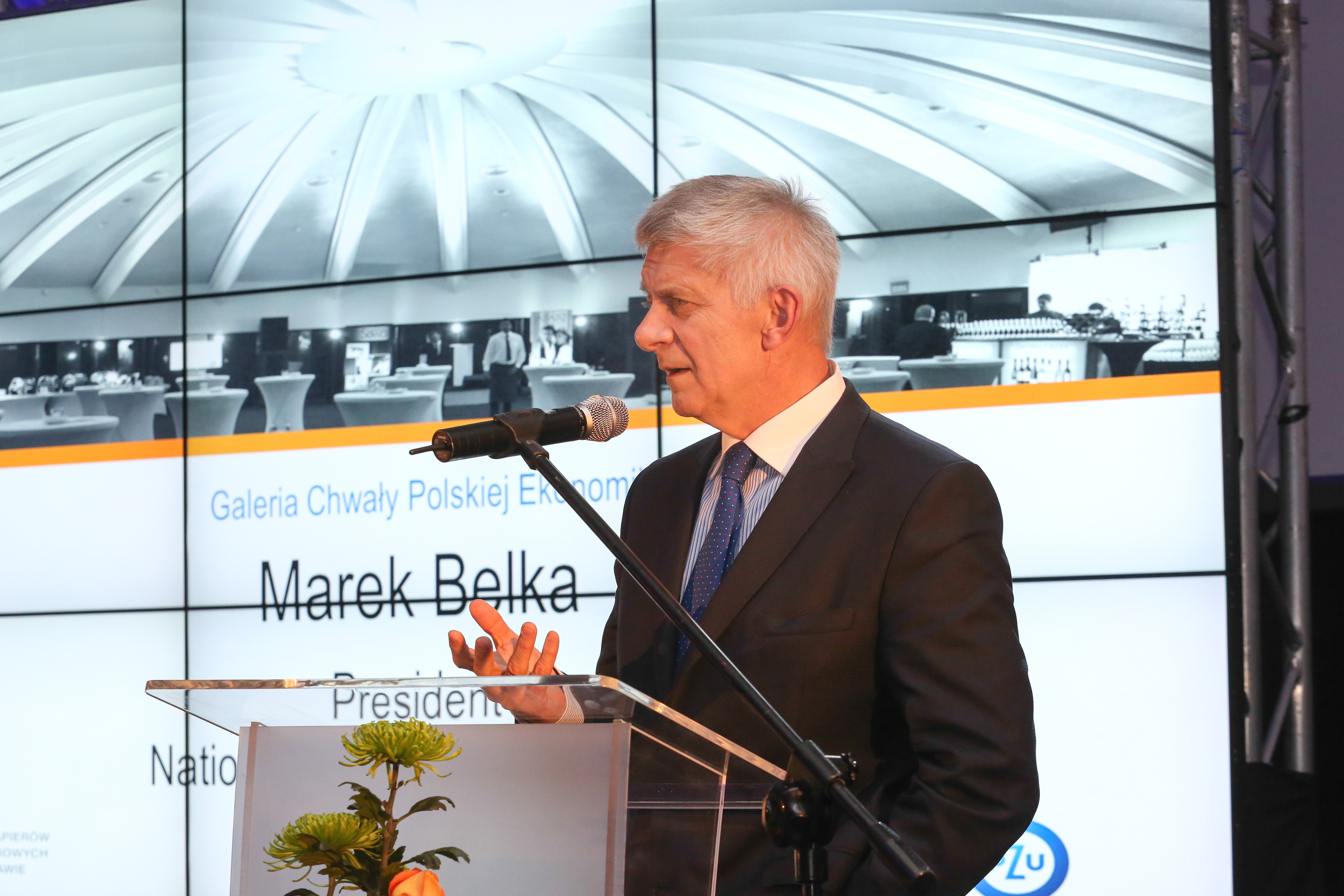 Marek Belka, Galeria Chwały Polskiej Ekonomii, 16. Oktober 2013, Warschau